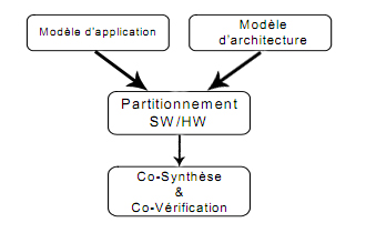 résumé du partitionnement logiciel/matériel en Y